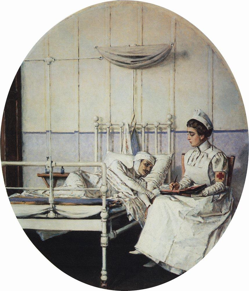 Письмо на родину (Письмо к матери)